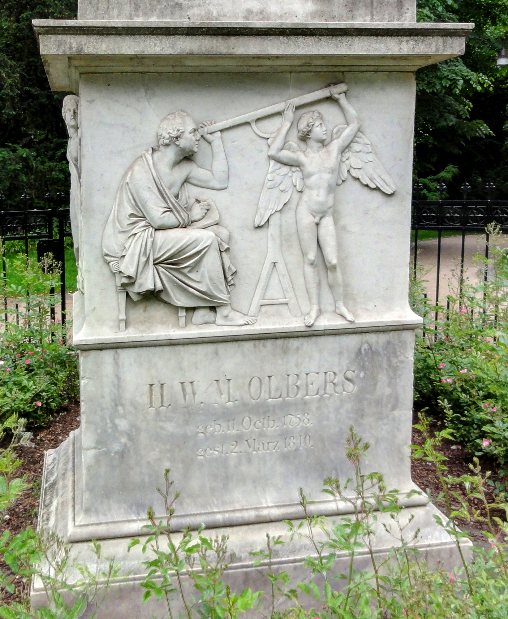 Olbers-Denkmal in Bremen, WallanlagenDas abgebildete Objekt ist ein geschütztes Kulturdenkmal in der Freien Hansestadt Bremen, mit der Nr. 1193,T002 beim Landesamt für Denkmalpflege registriert.